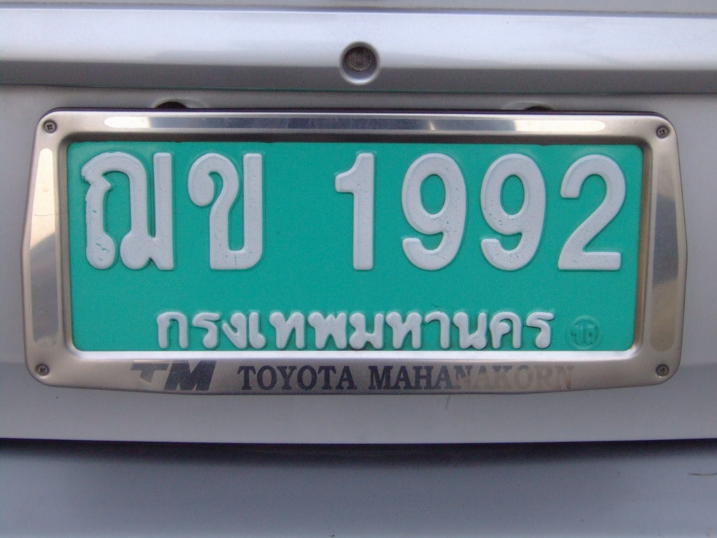 Targa di una limousine di un albergo Rayong - Thailandia Foto Propria